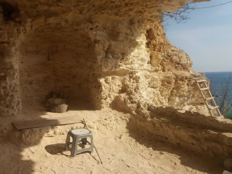 один из гротов мыса Виноградный